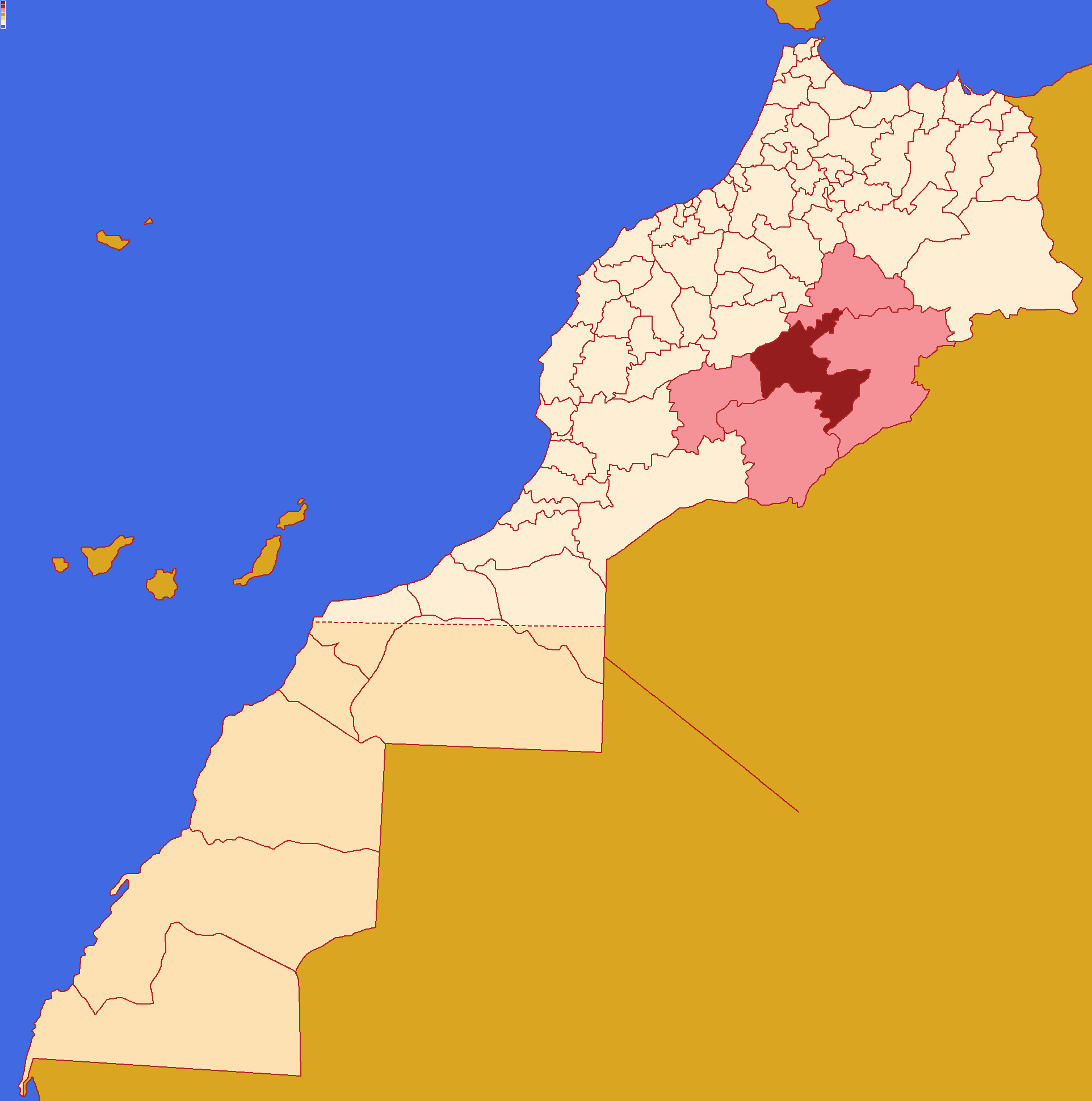 Localização da província de Tinghir ,dentro da região de Drá-Tafilete, dentro de Marrocos. Conforme a reforma admistrativa de 2015.